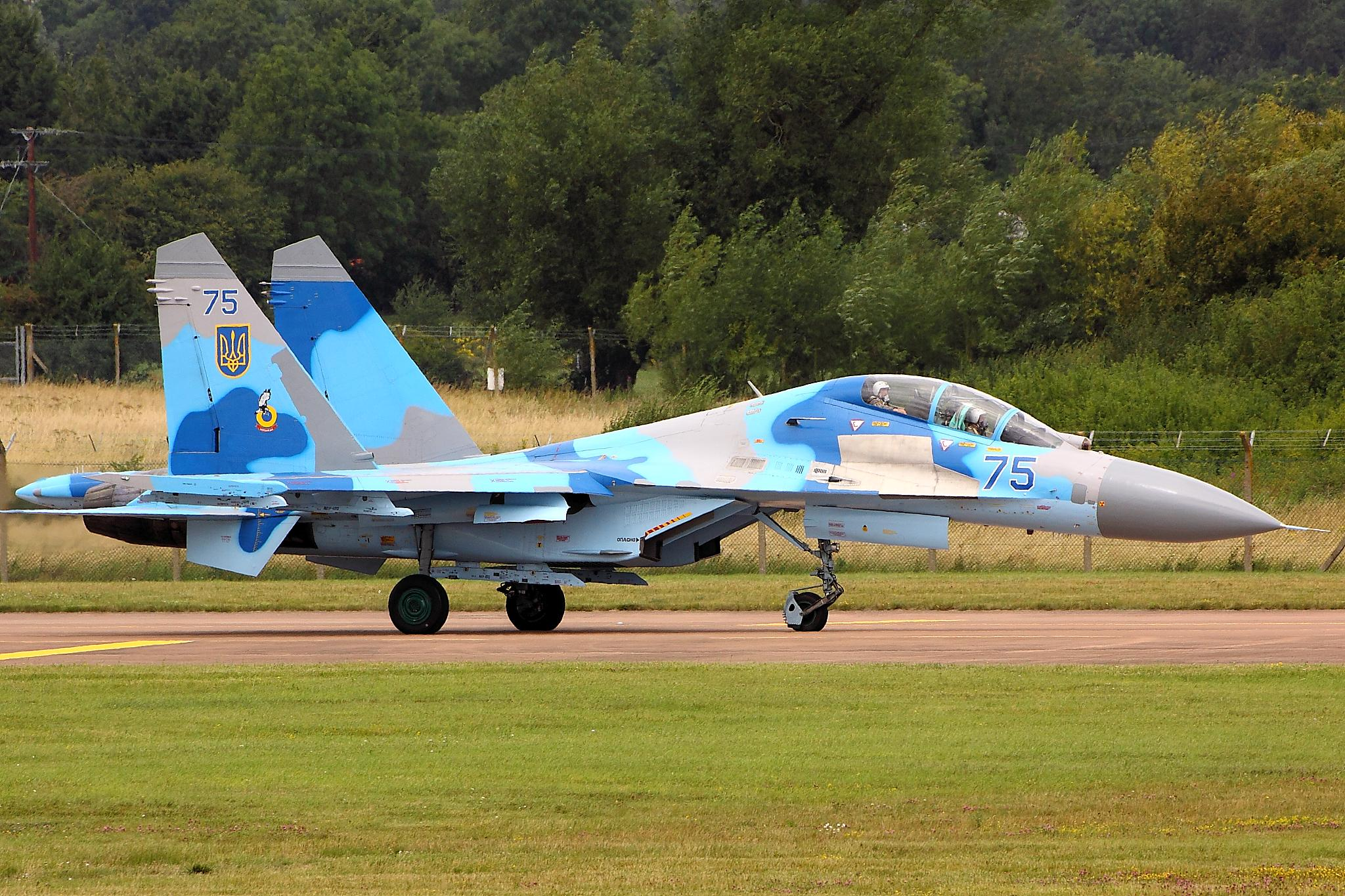 SU27 - RIAT 2011